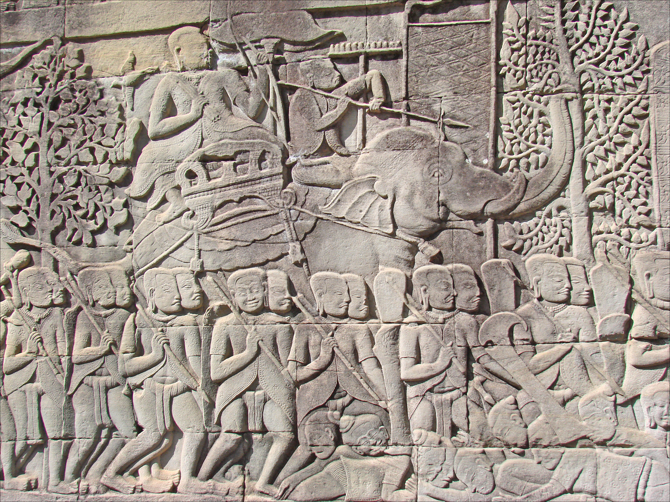 L'armée khmère victorieuse en marche, avec à l'arrière un haut chef militaire sur un éléphant et des soldats chams (?) à terre Galerie est du Bayon (Angkor) _________________ Le Bayon est le temple-montagne du roi khmer : Jayavarman VII (1181-1218), le vainqueur des Chams et le plus grand constructeur des rois khmers. La construction du Bayon a commencé vers 1195. Ce temple est célèbre pour ses 54 tours décorées par 4 visages. Comme temple d'Etat, il était au centre d'Angkor Thom, la capitale du royaume. C'est un temple "œcuménique " qui associe l'hindouisme (les dieux Shiva et Vishnu y sont largement présents) et le bouddhisme car le Roi était lui-même bouddhiste du grand véhicule : Mahâyâna. Le Roi et la famille royale étaient représentés dans le Bayon sous forme de bouddhas dans les chapelles entourant la grande tour centrale.